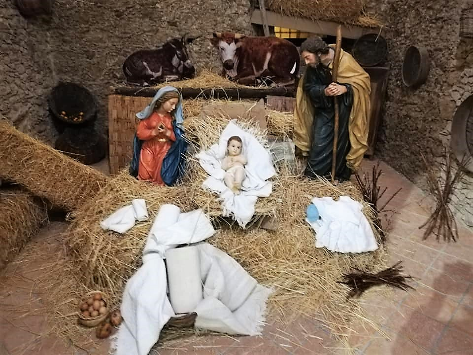 Presepe.